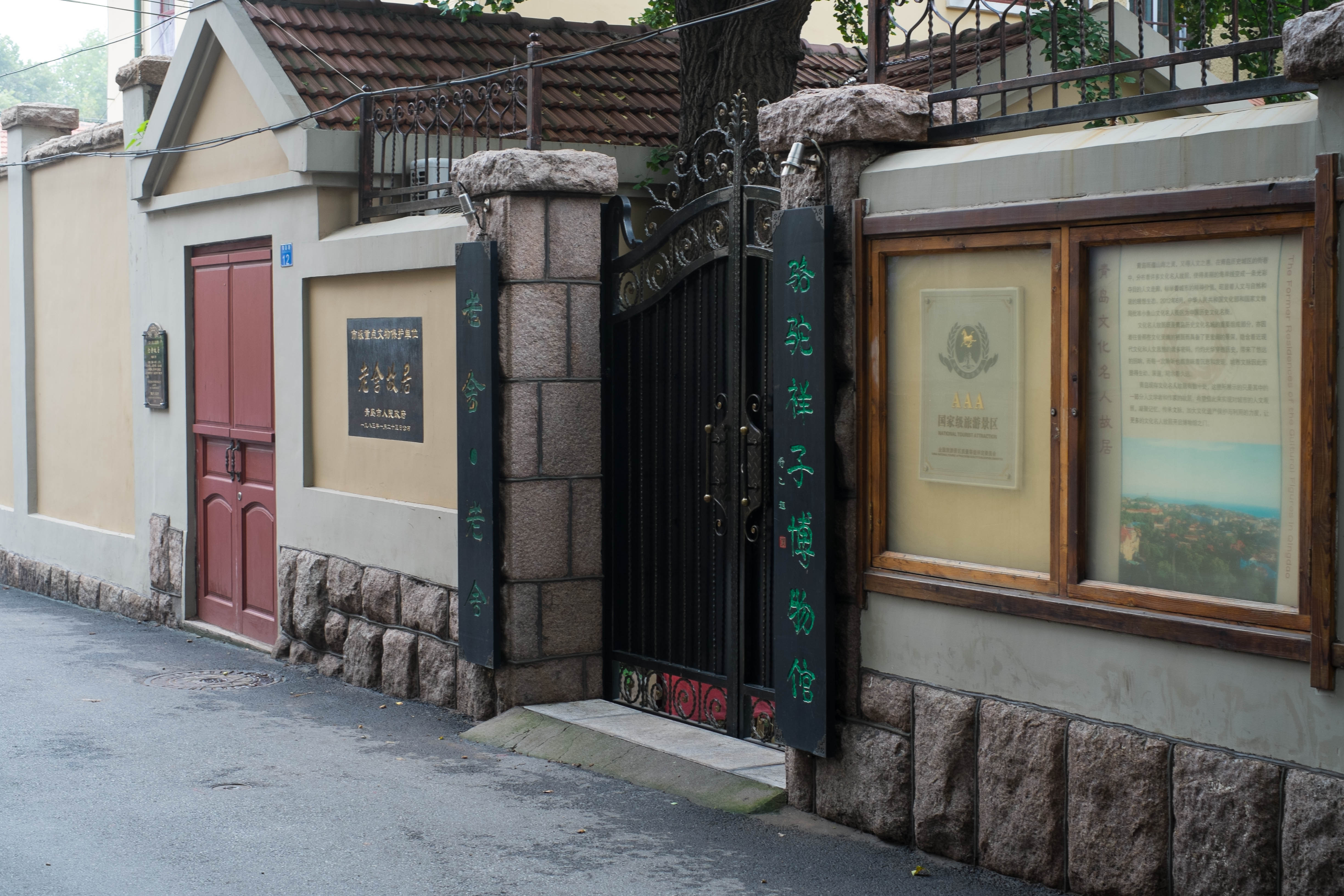 青岛老舍故居正门